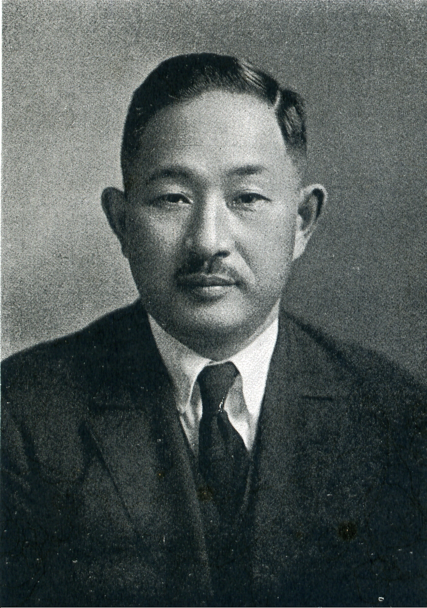 この写真は、豊田収（1882-1969）の写真です。